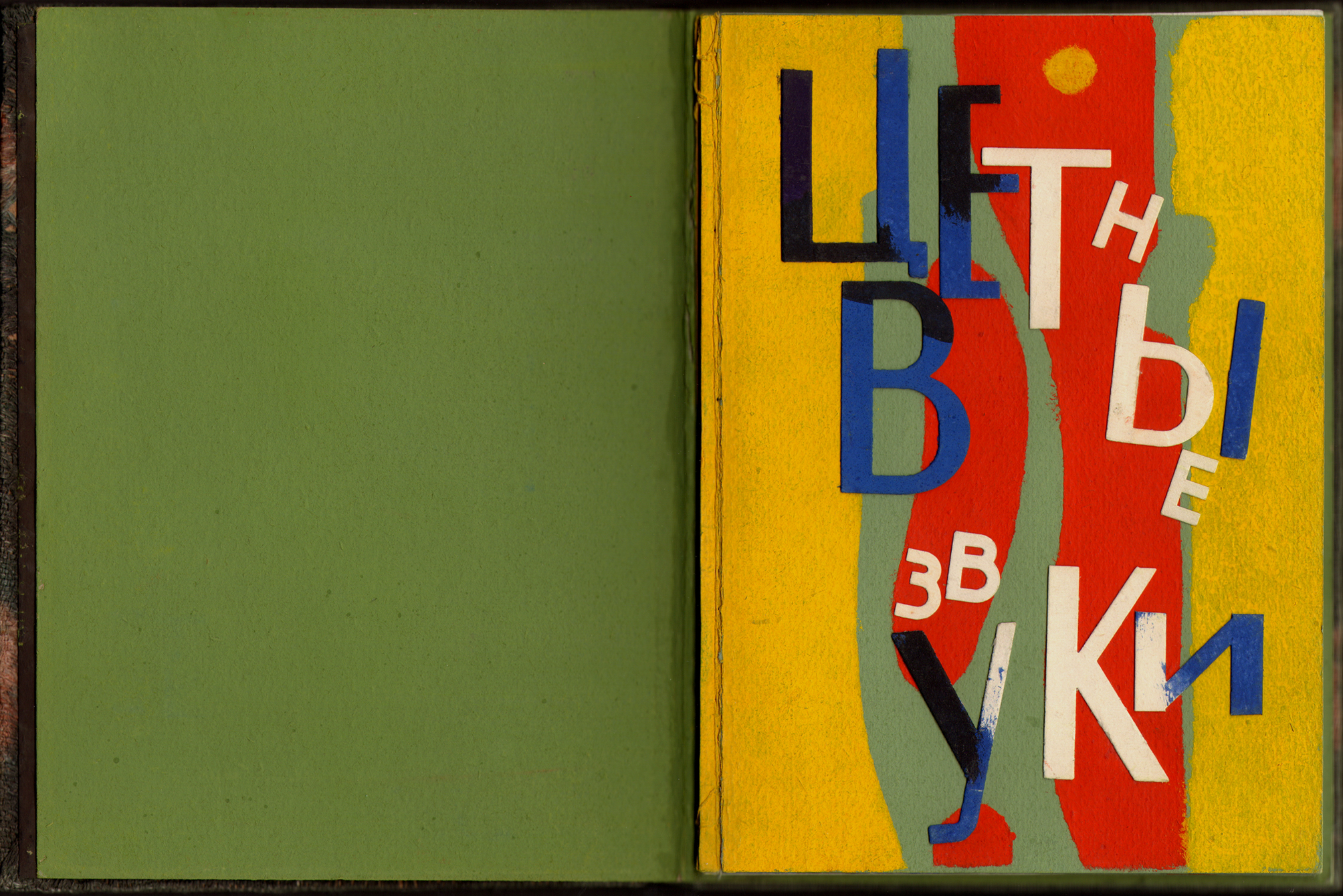 Книга художника, Русское искусство ХХ века